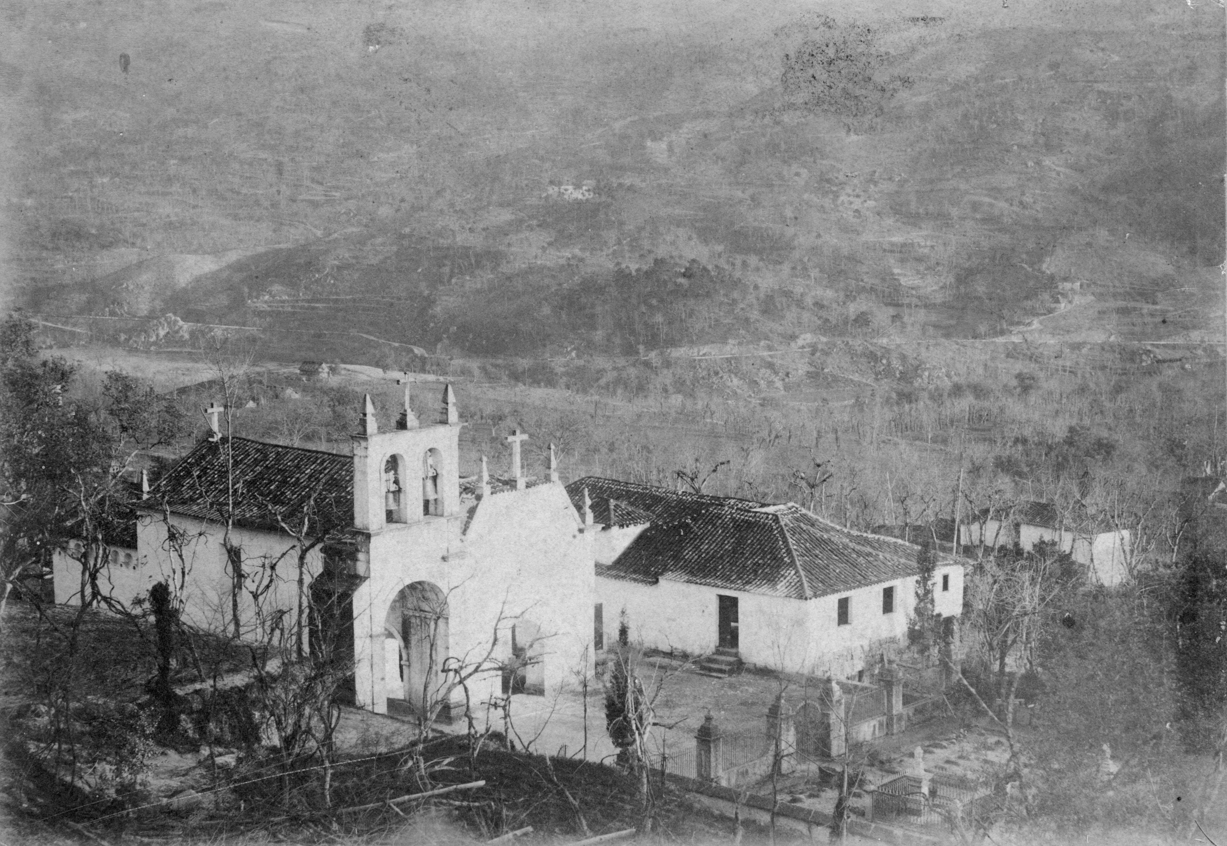 Photographie de l'église de Gatão, Amarante, portugal, datant de 1892.